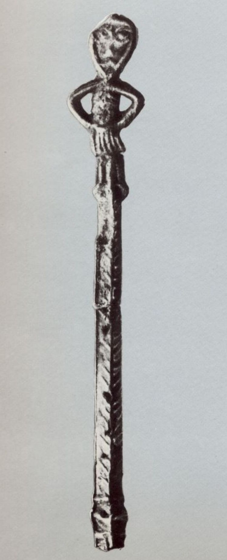 Figurka Peruna z Nowogrodu Wielkiego Miejsce znalezienia: Nowogród Wielki, Rosja Datowanie: XI wiek lub poł. XII wiek. Umieszczona na słupku i tworząca z nim całość figurka metalowa, przedstawiająca mężczyznę w długiej, pomarszczonej koszuli, podpartego pod boki. Nogi zwisają z słupka. Figurka ta uważana jest za wyobrażenie boga burzy Peruna. Podobno przemawiać za tym mają ukośne linie na słupku posążku, takie, jak na Świętowicie z Wolina. Świętowita utożsamiano z Perunem, ale też ze Swarogiem, więc nie bardzo wiadomo akurat tego pierwszego. W Polsce, w Opolu, znaleziono podobną figurkę na słupku, wykonaną z podobnego materiału. Wyobraża ona jednak wojownika w pancerzu, a stylem zdaje się nawiązywać do wcześniejszych wyrobów wielkomorawskich. Przedmiot z Opola uważano za szpilę, ale zakończenie słupka figurki z Nowogrodu zdaje się temu przeczyć. Uważa się też, że figurka z Opola jest importem z Rusi, za czym mogłoby przemawiać jedynie - i to tylko po części - ewentualne późniejsze datowanie - XII w. (jest to jednak raczej datowanie warstwy, w której znaleziono przedmiot, i nie jest ono pewne, ponieważ źródła podają różne dane). Link